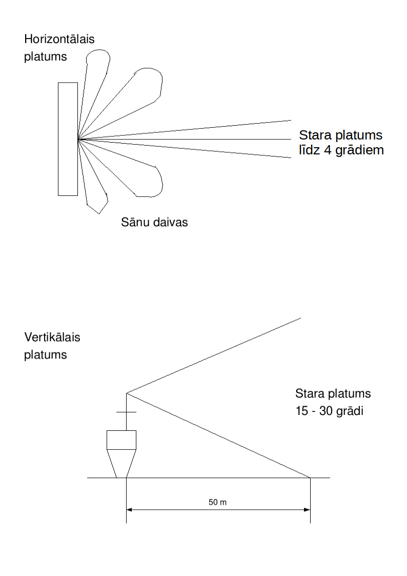 Izstarošanas diagramma